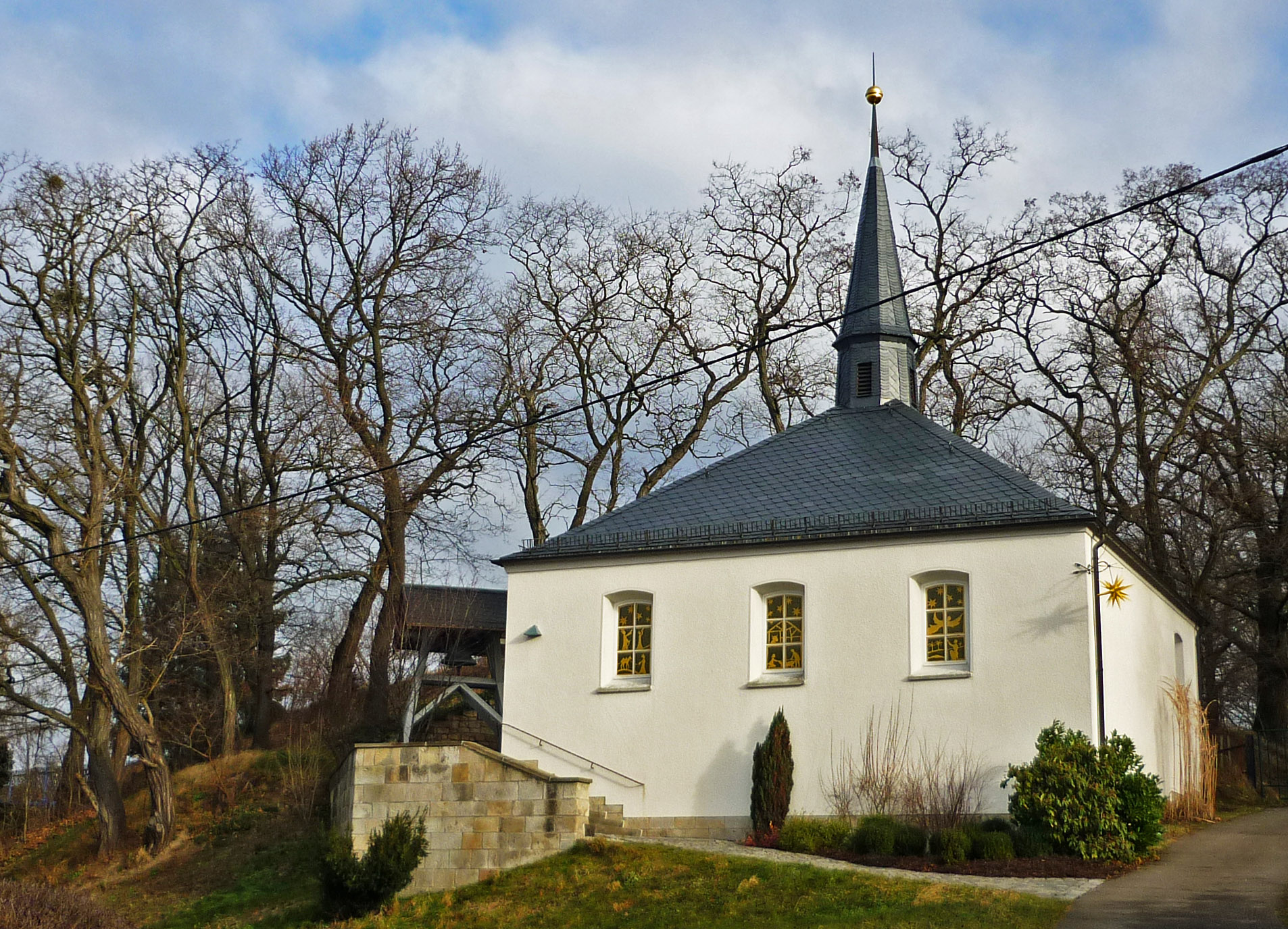 Ev.-luth. Friedenskapelle (Saarstraße) in Kleinnaundorf (Freital) in Sachsen